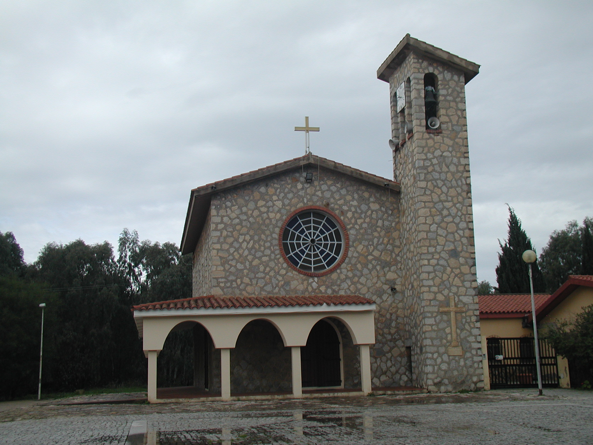 Chiesa di Santa Barbara a Bacu Abis, frazione di Carbonia